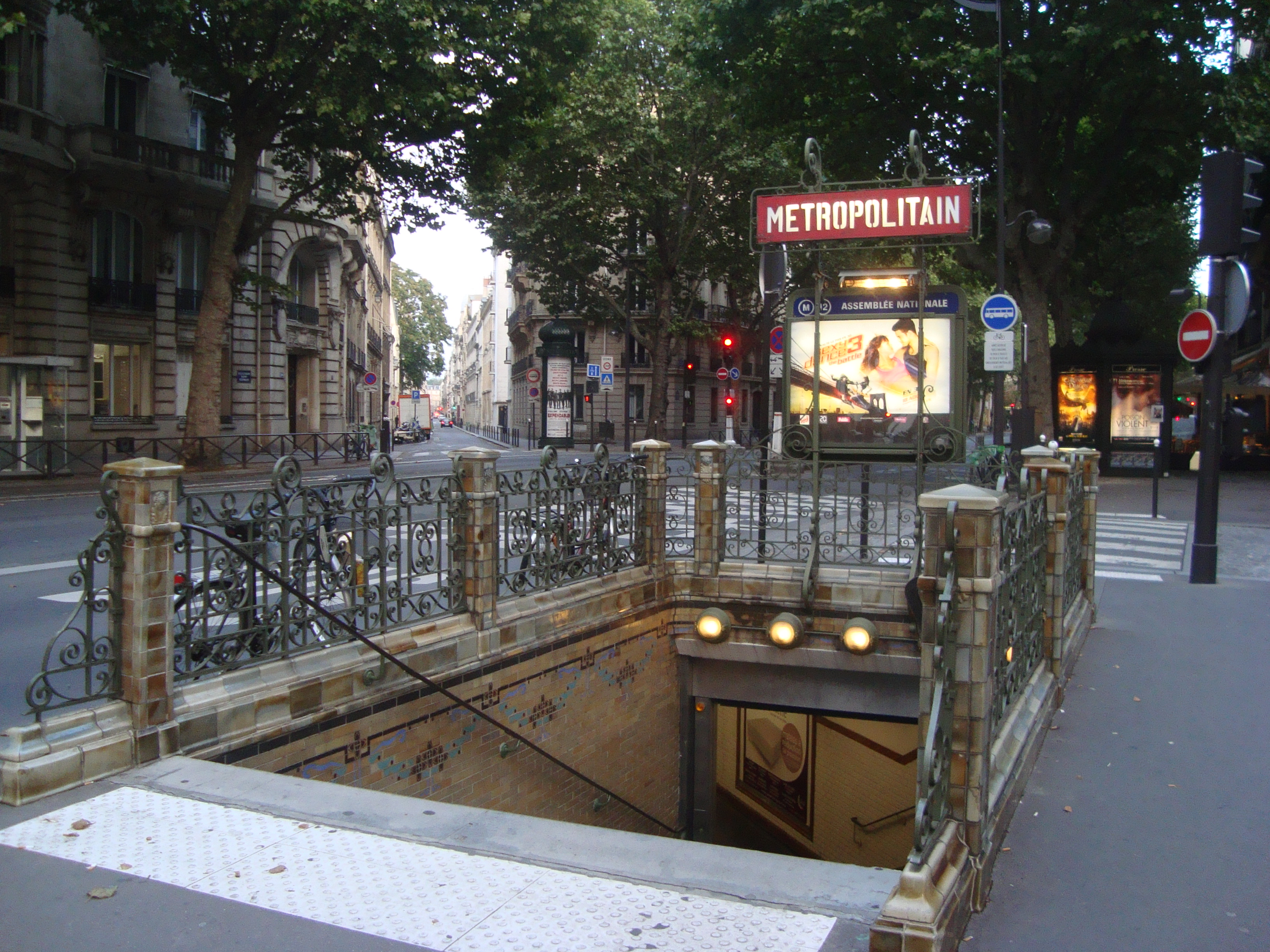 Accès angle boulevard Saint-Germain et rue de Lille au métro Assemblée nationale sur la ligne 12 du métro de Paris